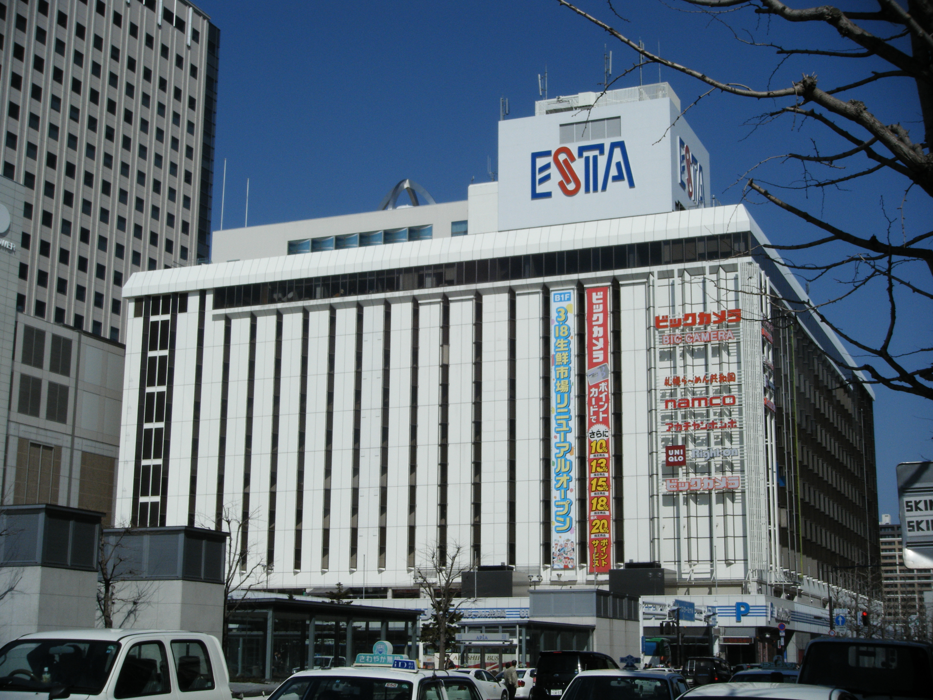 札幌駅南口交差点より